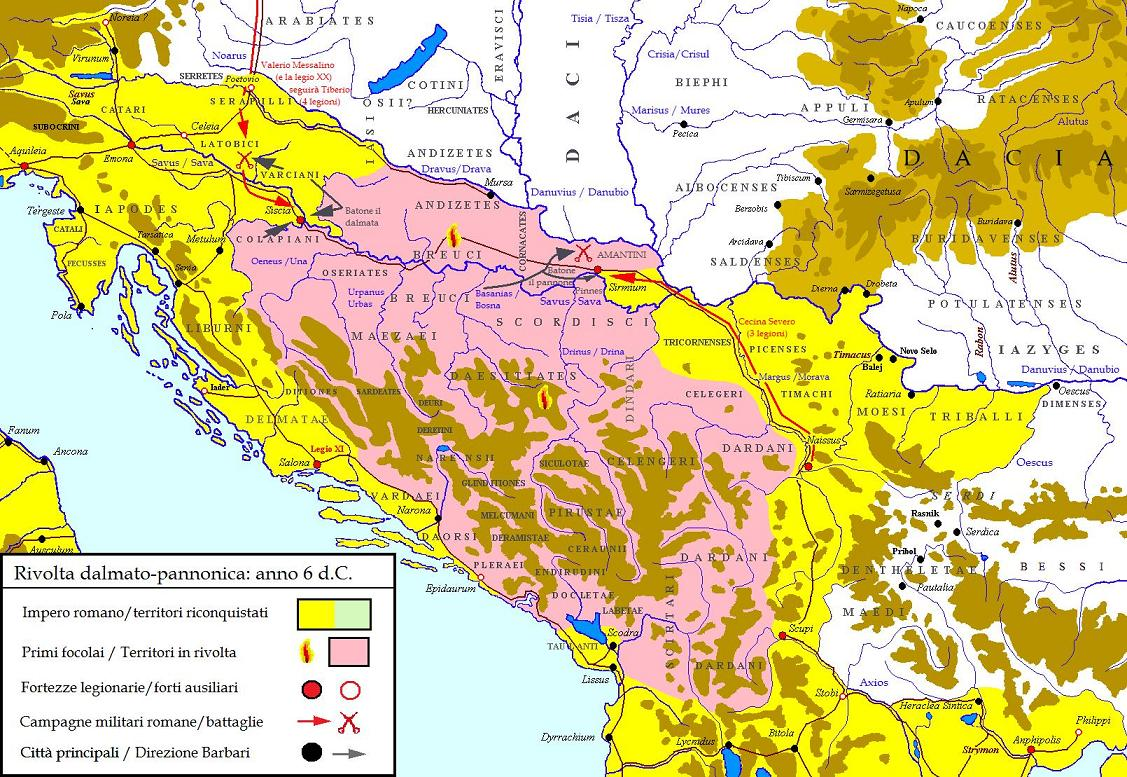 Rivolta dalmato-pannonica 6 A.D.